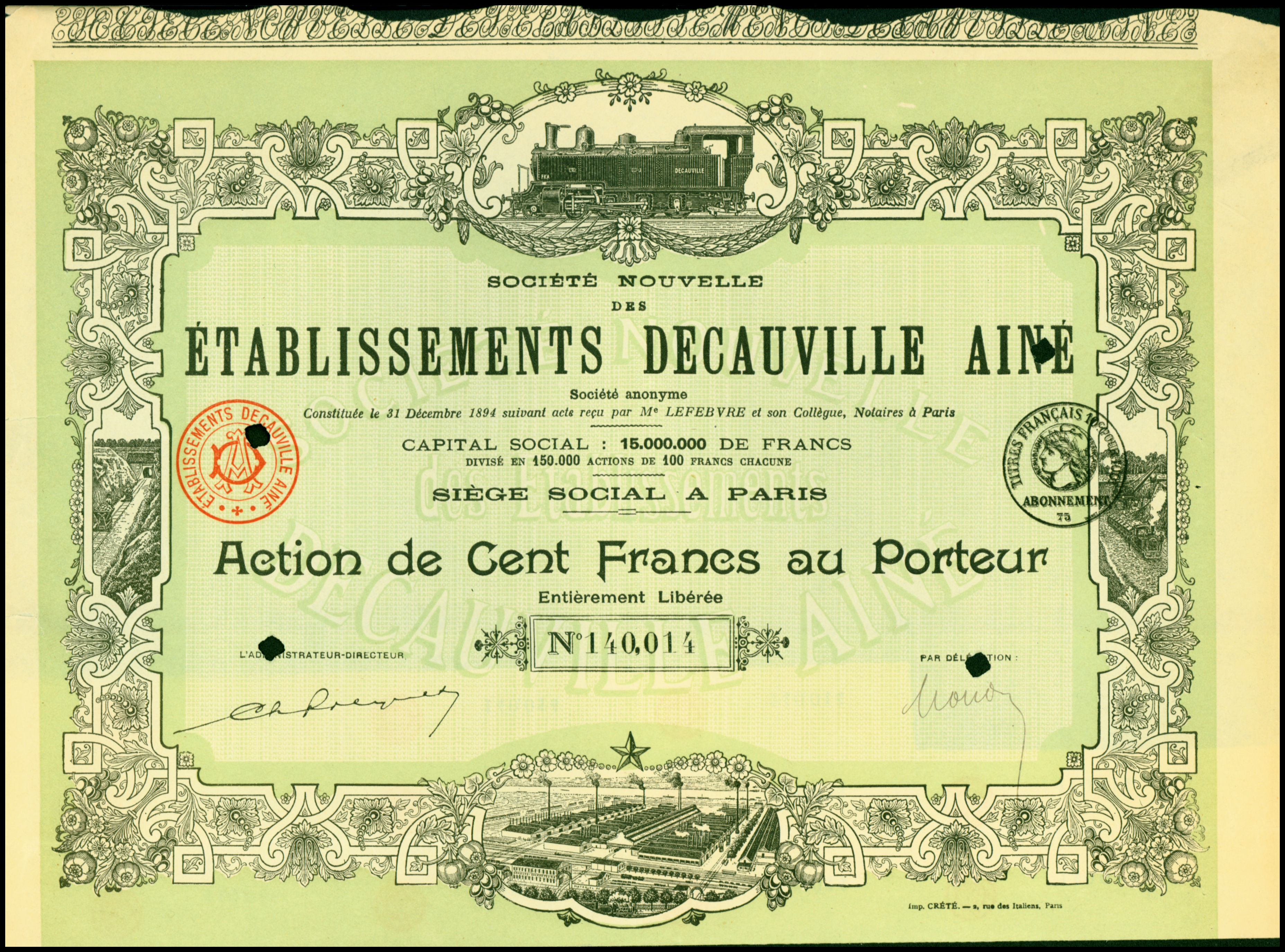 Aktie über 100 Francs der Etablissements Decauville von 1894